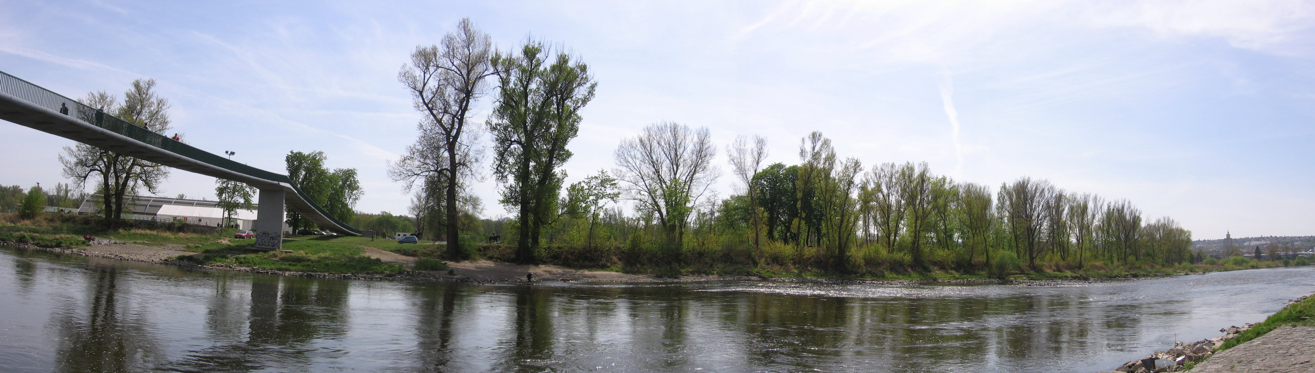 Císařský ostrov, panoráma, západní část